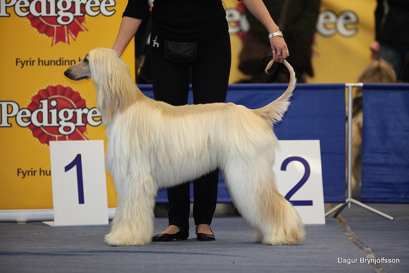 Hundasýning 2009 053